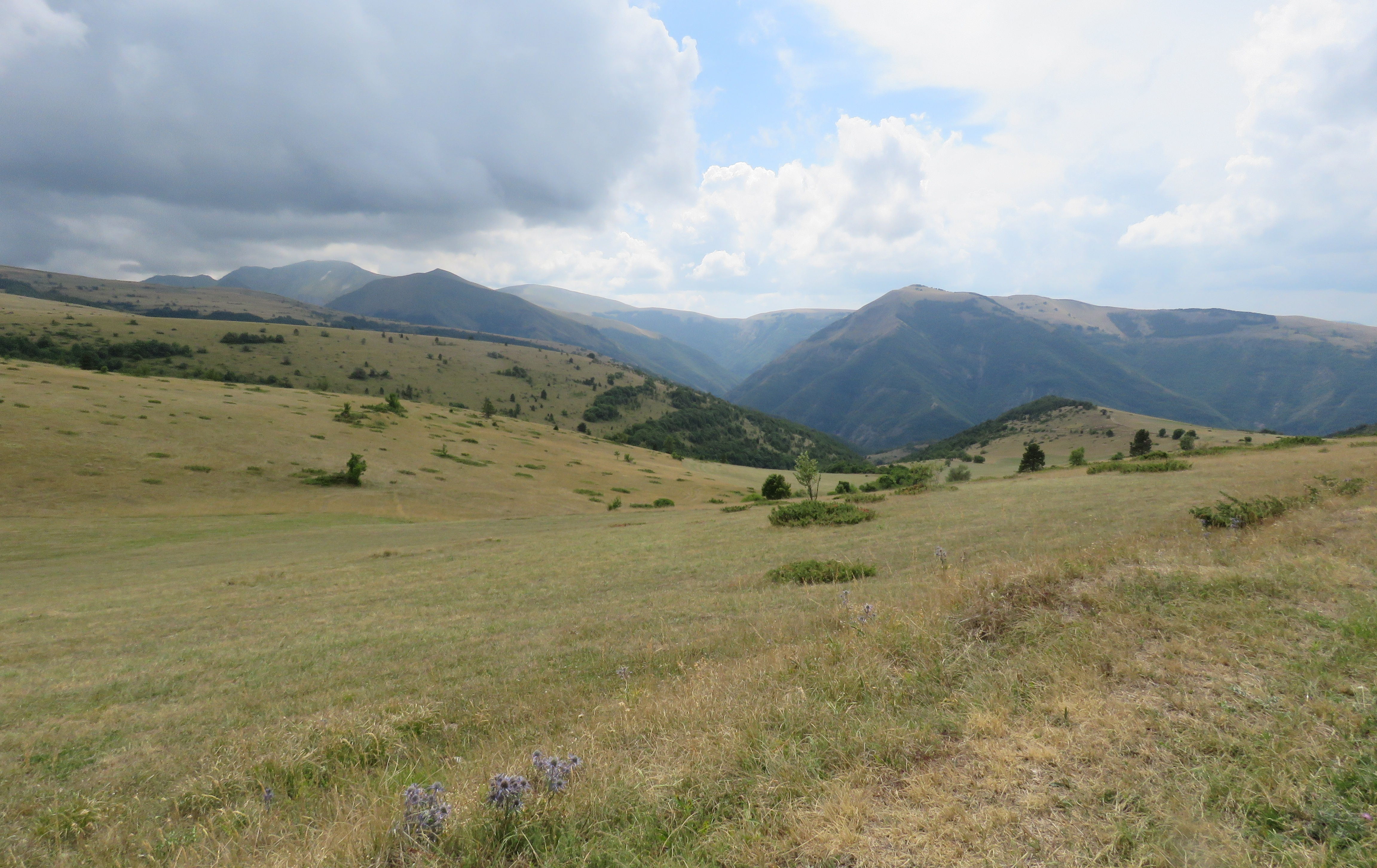 Charakteristisches Landschaftsbild der nördlichen Sibillinischen Berge. Das Foto zeigt den Blick von einem Standpunkt im Bergland östlich von Fiastra bei etwa 1.100 m ü. M.; Blickrichtung nach Süden auf die Untergruppe Monti di Bolognola; im Mittelgrund das Tal des Fiume Fiastrone.